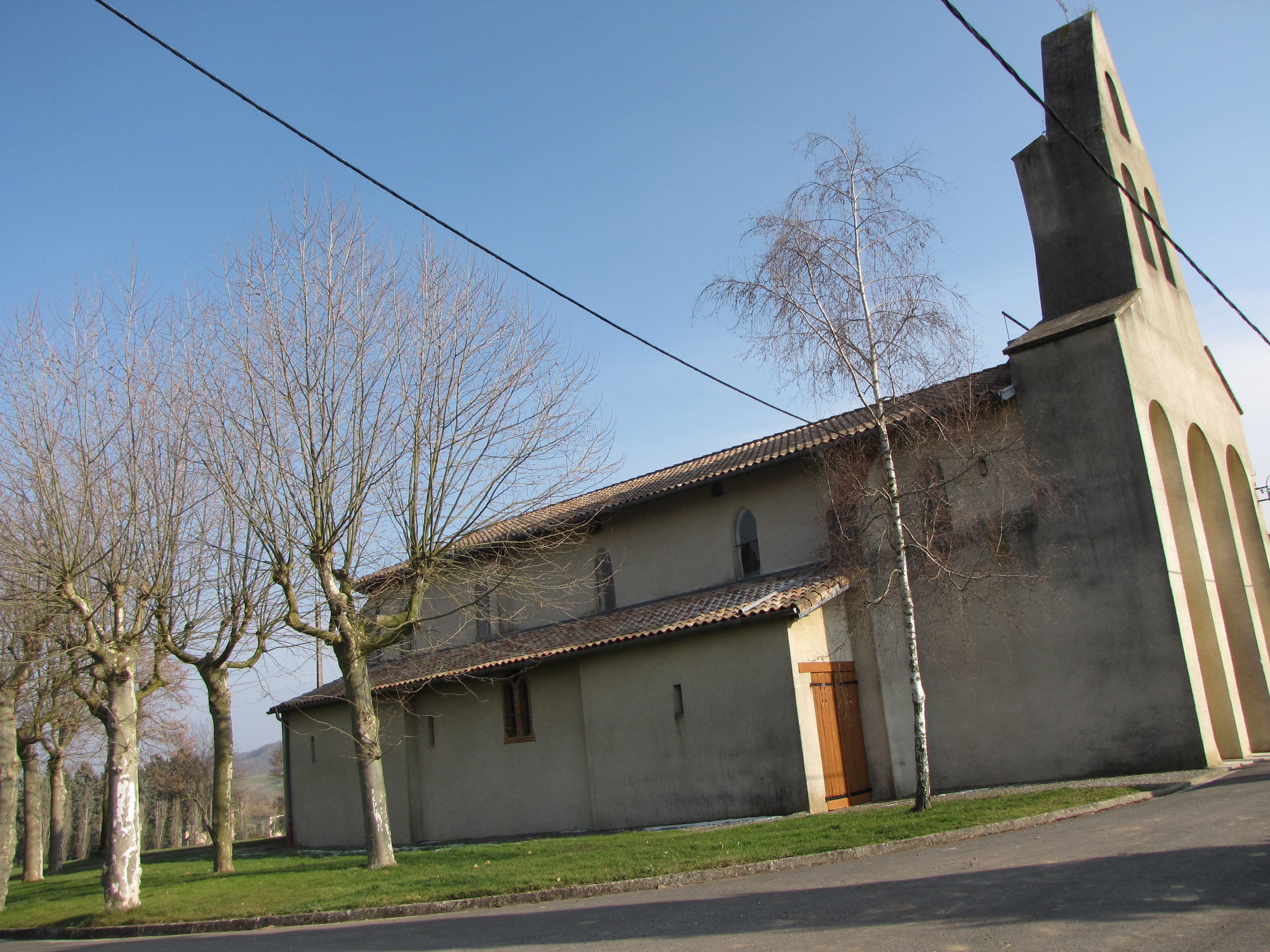 Église du Pouy-de-Touges